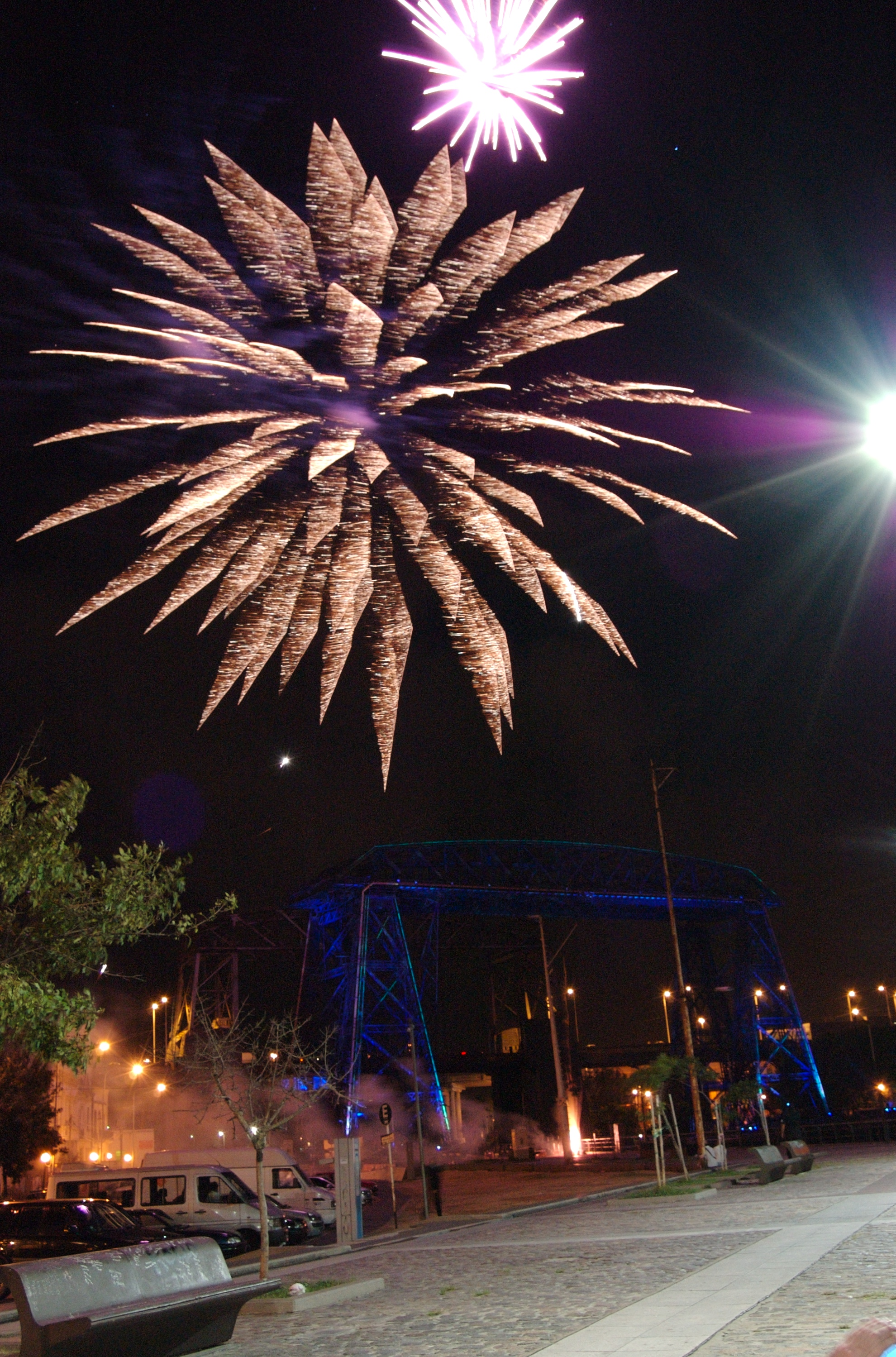 Puente transbordador Nicolás Avellaneda, barrio de La Boca, Buenos Aires, Argentina.